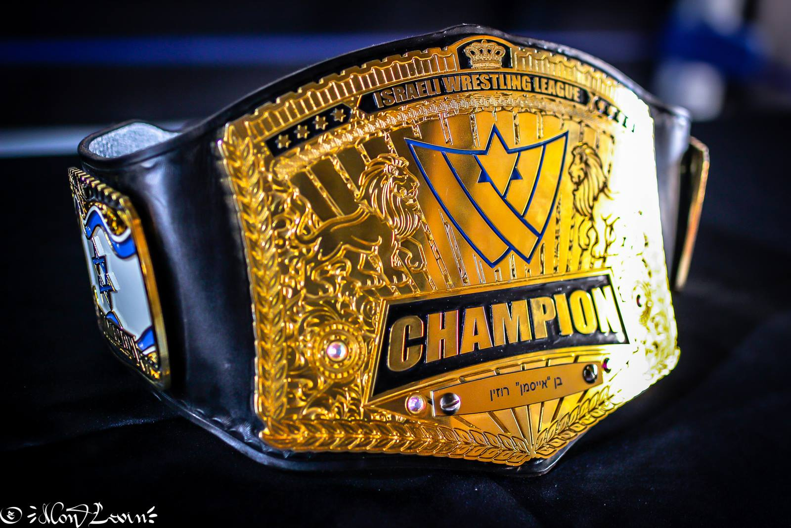 אליפות ליגת ההיאבקות הישראלית (צילום: אלון לוין)